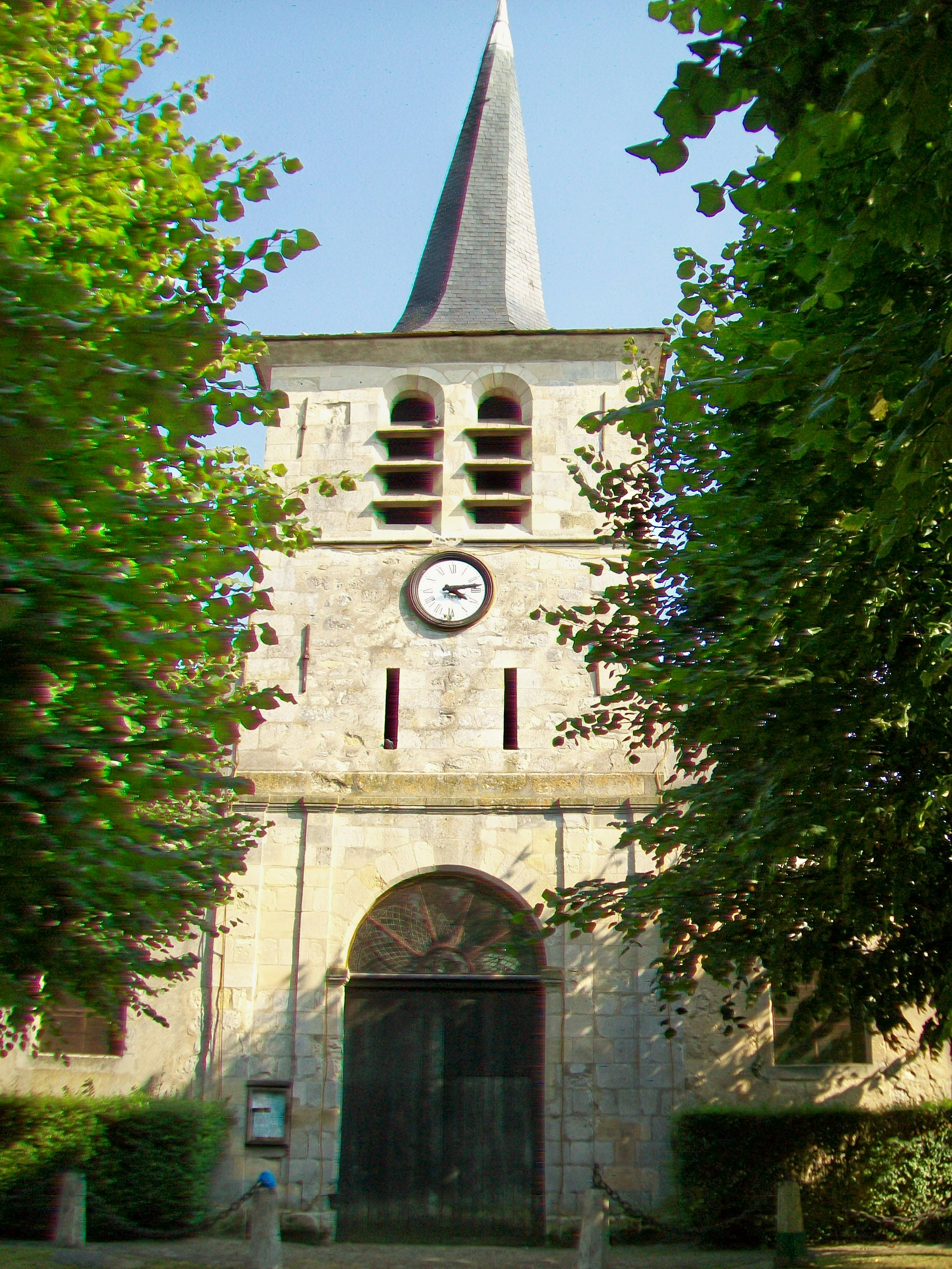 La façade occidentale.